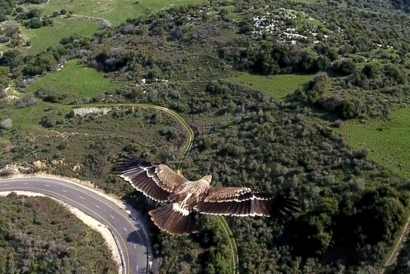 עיט שמש מעל 'תל ראש' המזוהה כ'בית שמש נפתלי'